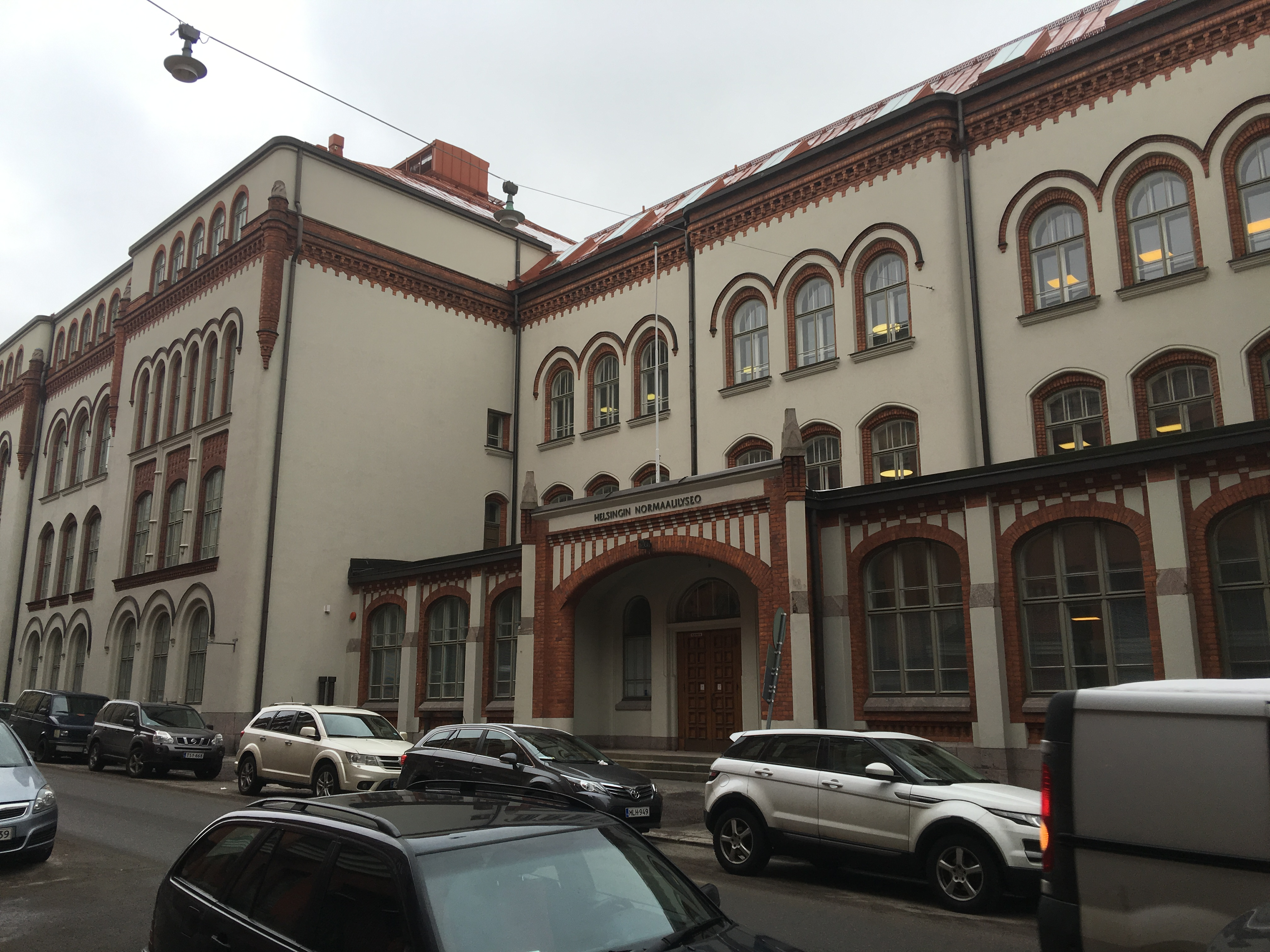 Helsingin Normaalilyseon Ratakadun puoleinen sisäänkäynti.